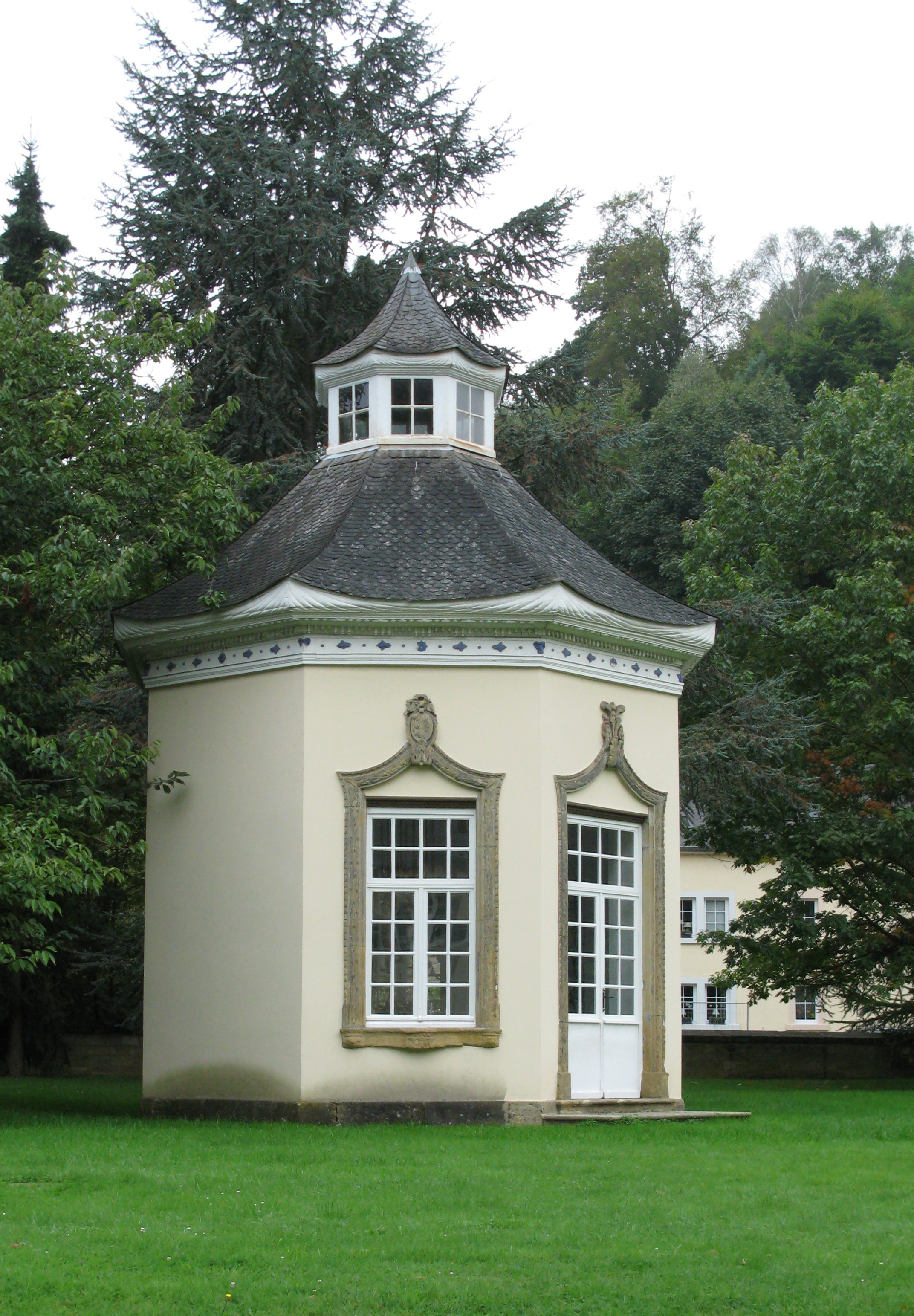 Pavillon am Schlasspark